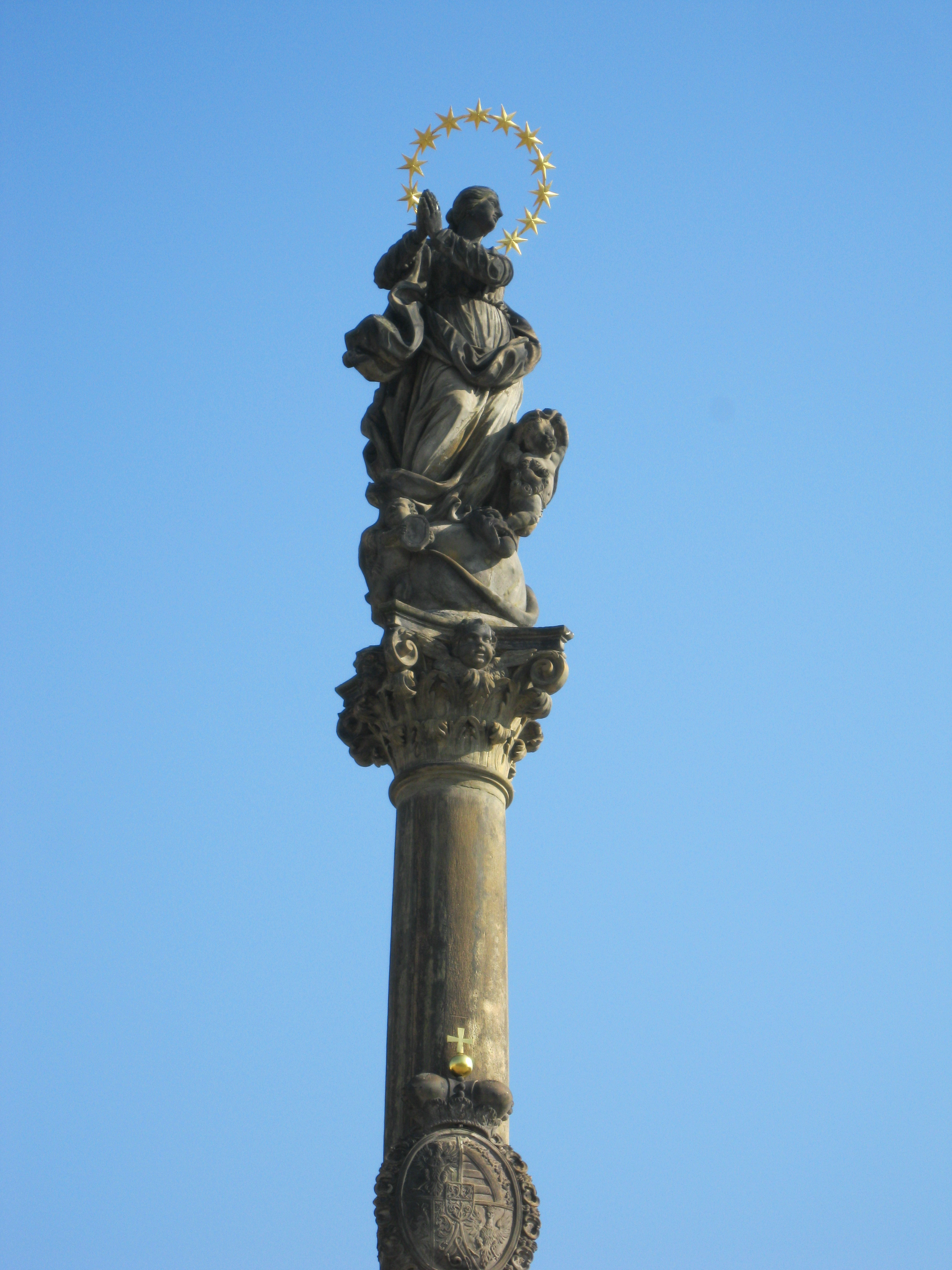 Sloup se sousoším - Morový sloup (Moravská Třebová)